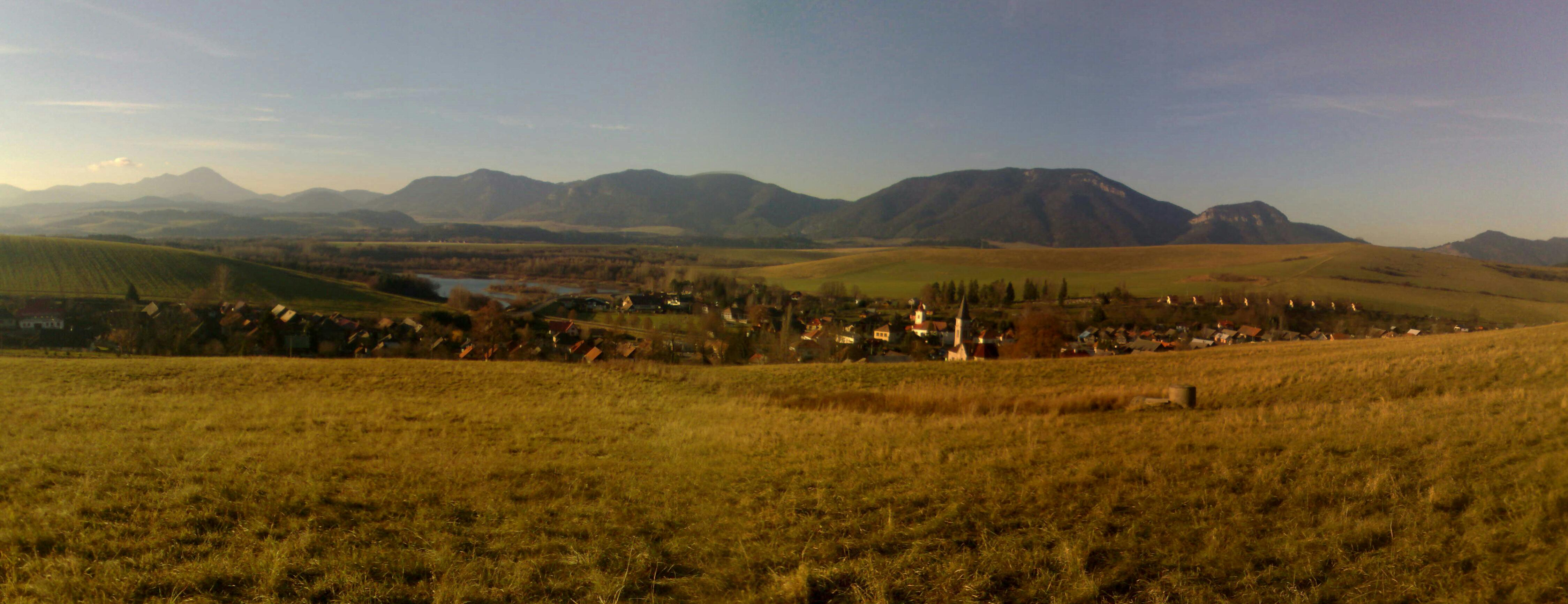 Foceno 14:23